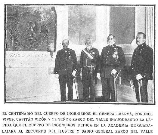 Centenario del cuerpo de ingenieros, Marvá, Vives, Vicón y Zarco del Valle, en la revista La Ilustración Militar.